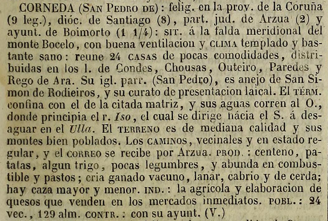 Corneda no Diccionario geográfico-estadístico-histórico de España y sus posesiones de Ultramar.